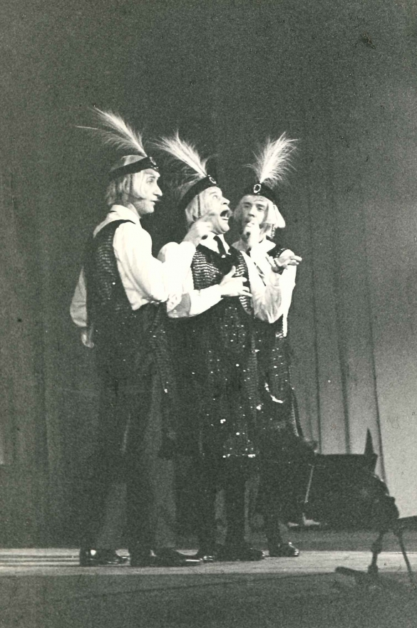 Gli attori: Enzo Garinei, Carlo Sposito e Toni Ucci sul palco del Teatro Nuovo di Salsomaggiore